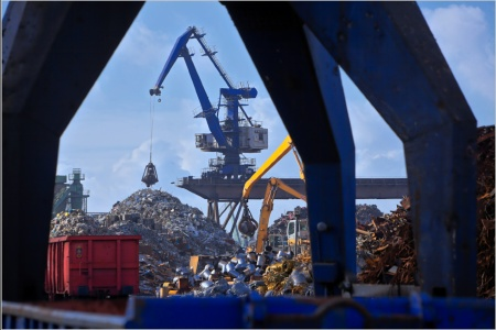 Deutschlands größter Binnen Schrottumschlagshafen